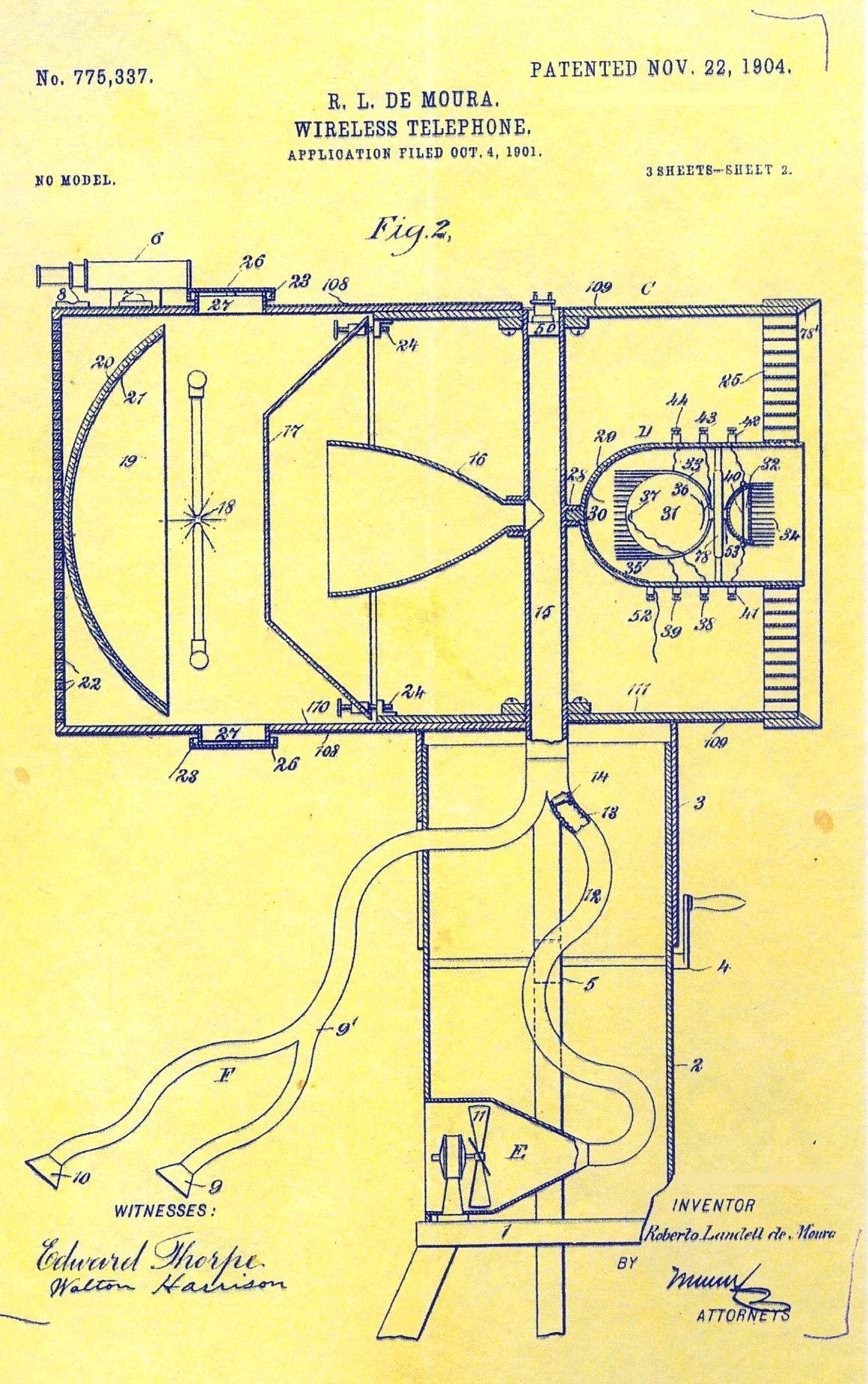 Hardware do Telefone Sem fio - "Wireless Telephone", aparelho patenteado por Landell de Moura em 1904 no Departamento de Patentes dos Estados Unidos